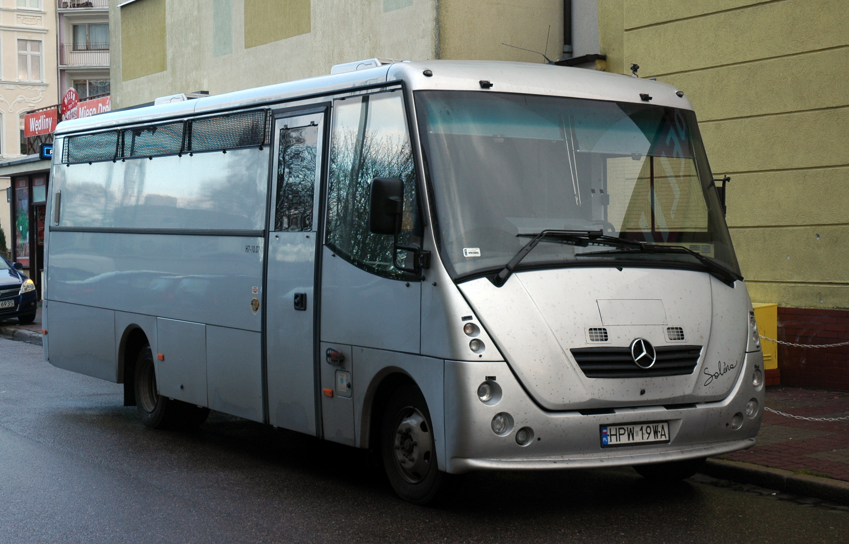 Więźniarka Autosan H7 10.07 Solina w Kołobrzegu